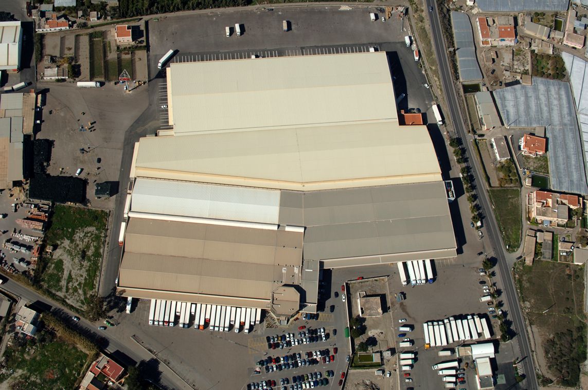 Fotografía aérea de la cooperativa CASI